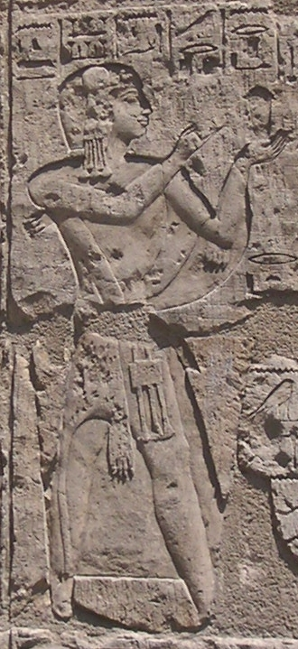 Relief représentant le grand prêtre de Ptah Sheshonq, fils d'Osorkon II - XXIIe dynastie égyptienne - Jardin du Musée du Caire